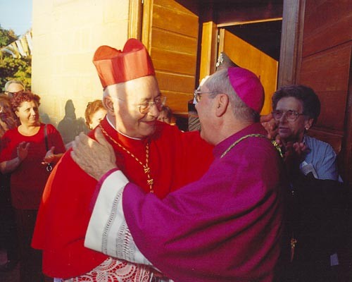 Il Cardinale De Giorgi saluta il vescovo De Grisantis.